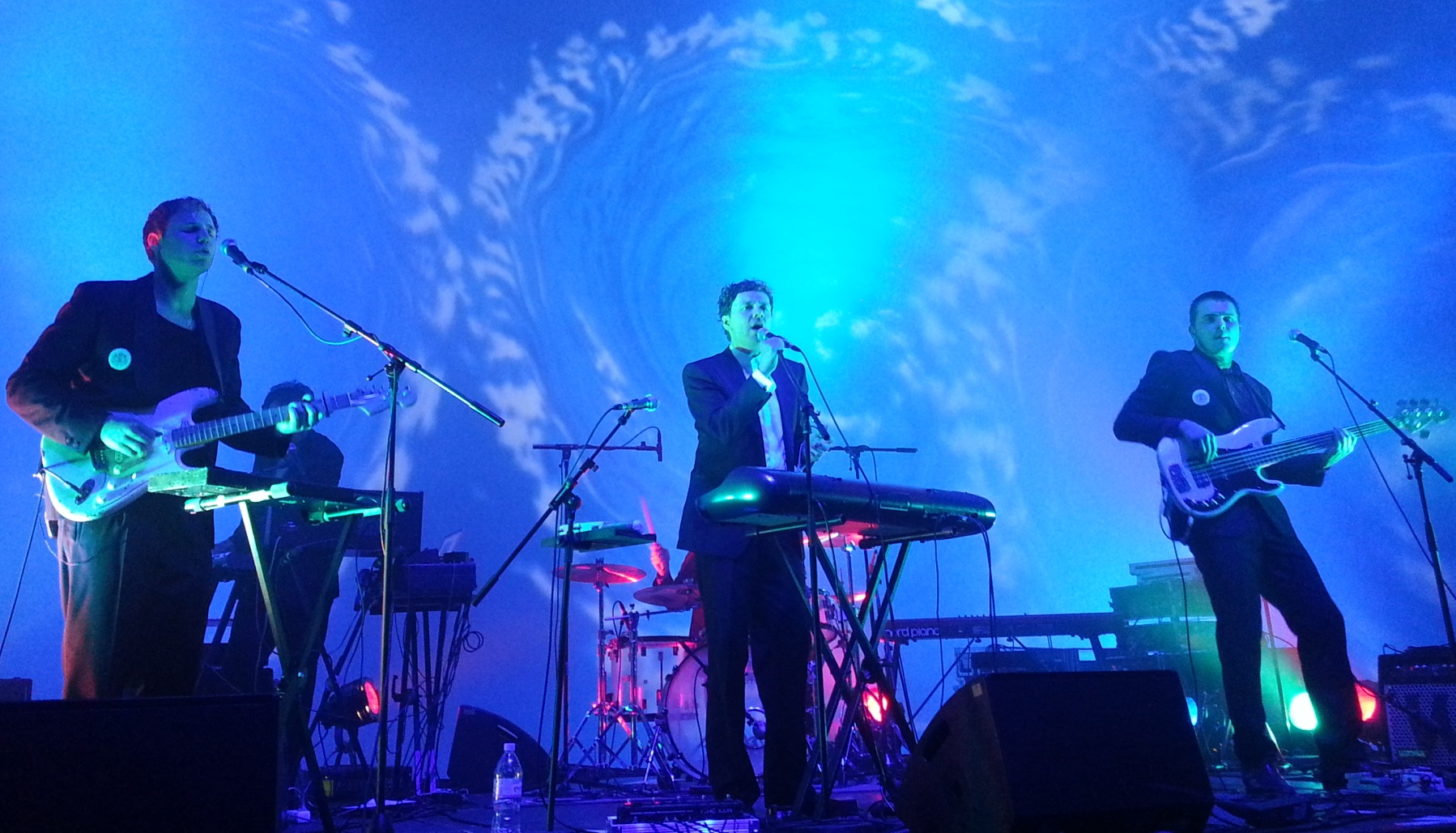 Christian Friedel mit Woods of Birnam auf der Bühne des Schauspielhaus Dresden bei der Geburtstagsparty „100 Jahre Schauspielhaus“